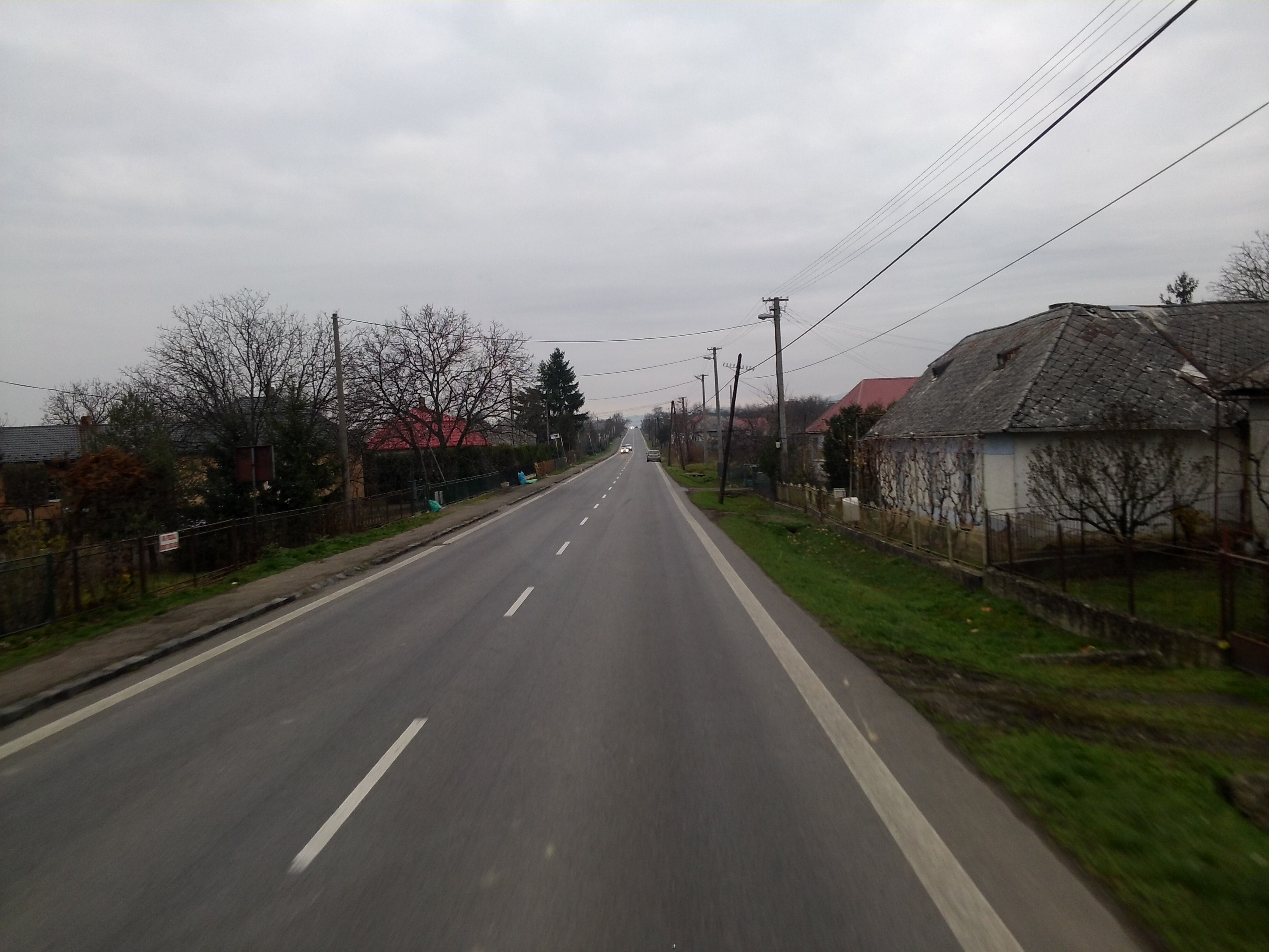 с. Крчава